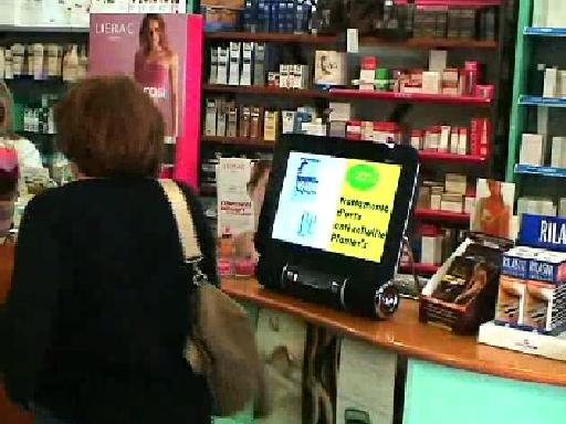 Pharmrmacy Digital Signage